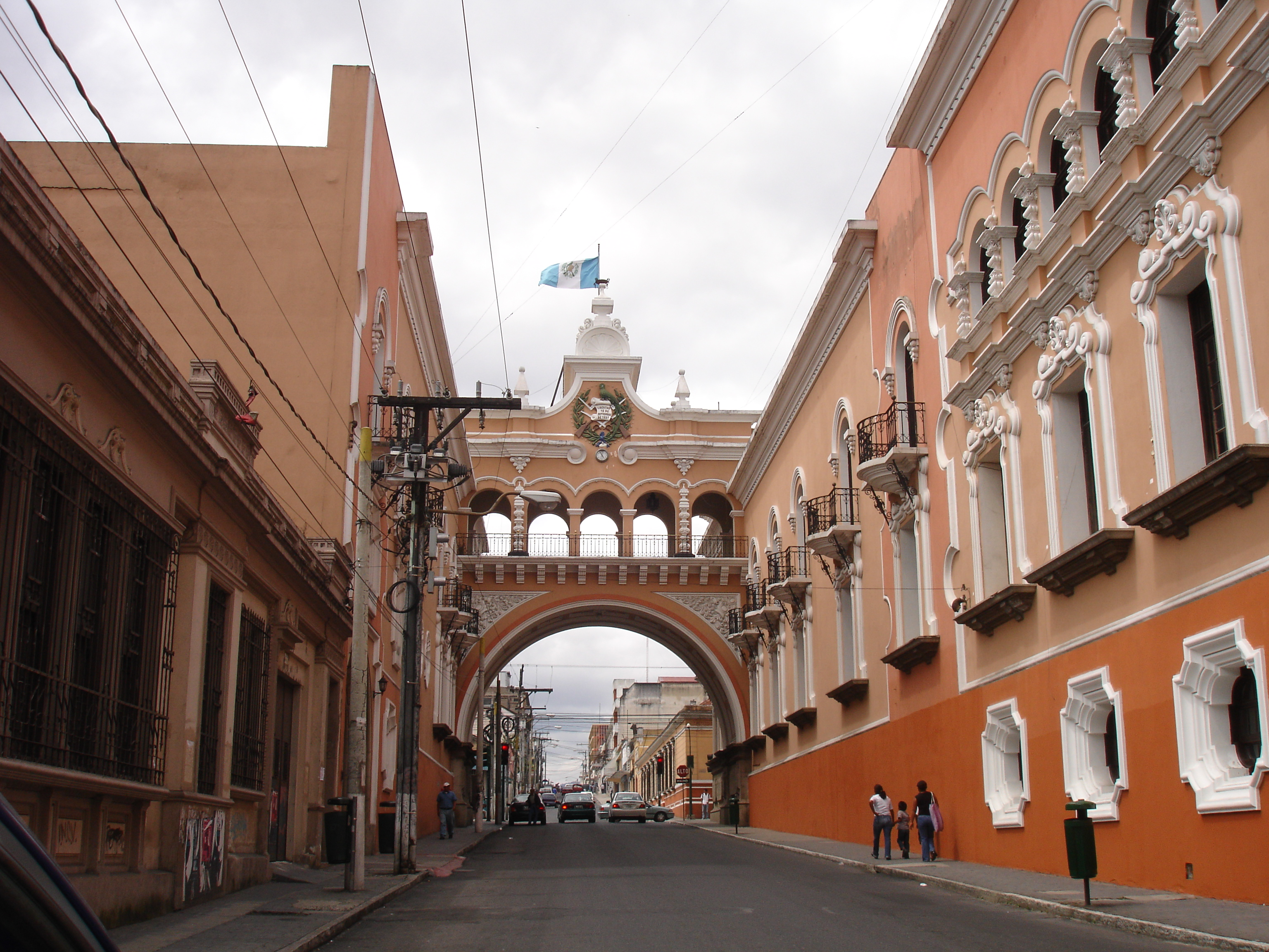 Ubicado en zona 1, Centro de Guatemala